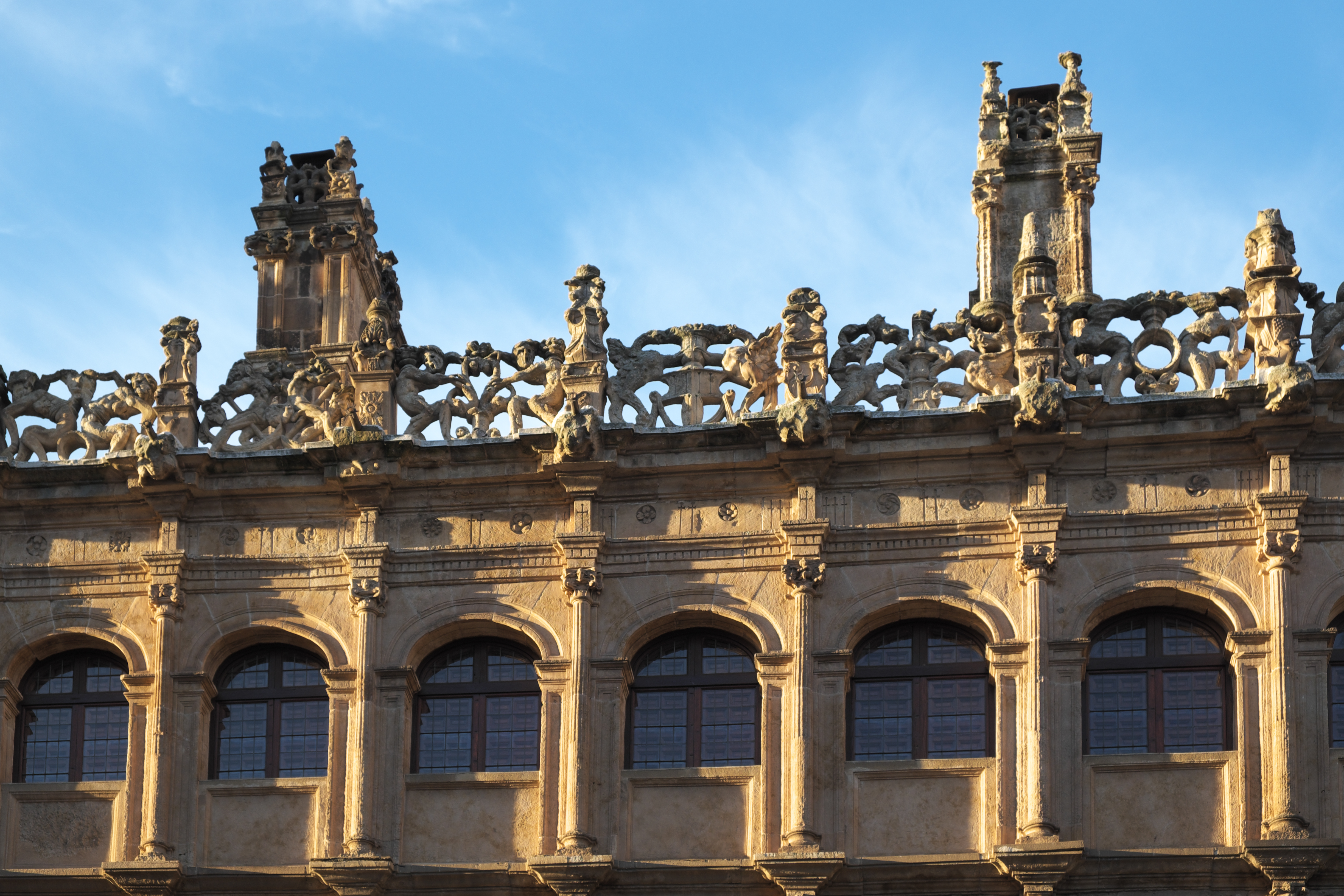 Palacio de Monterrey in Salamanca (Kastilien-León/Spanien)